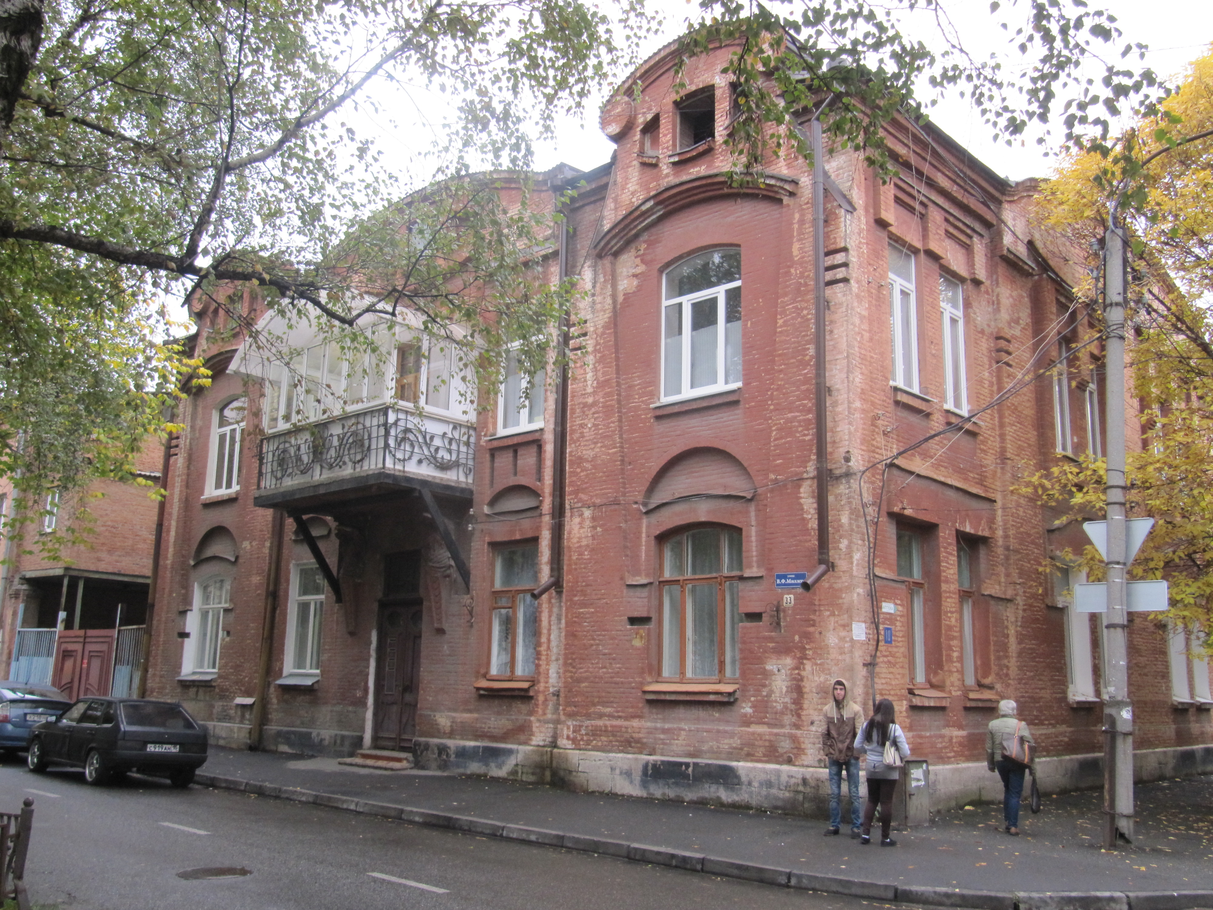 Дом № 33 на улице Миллера, Владикавказ